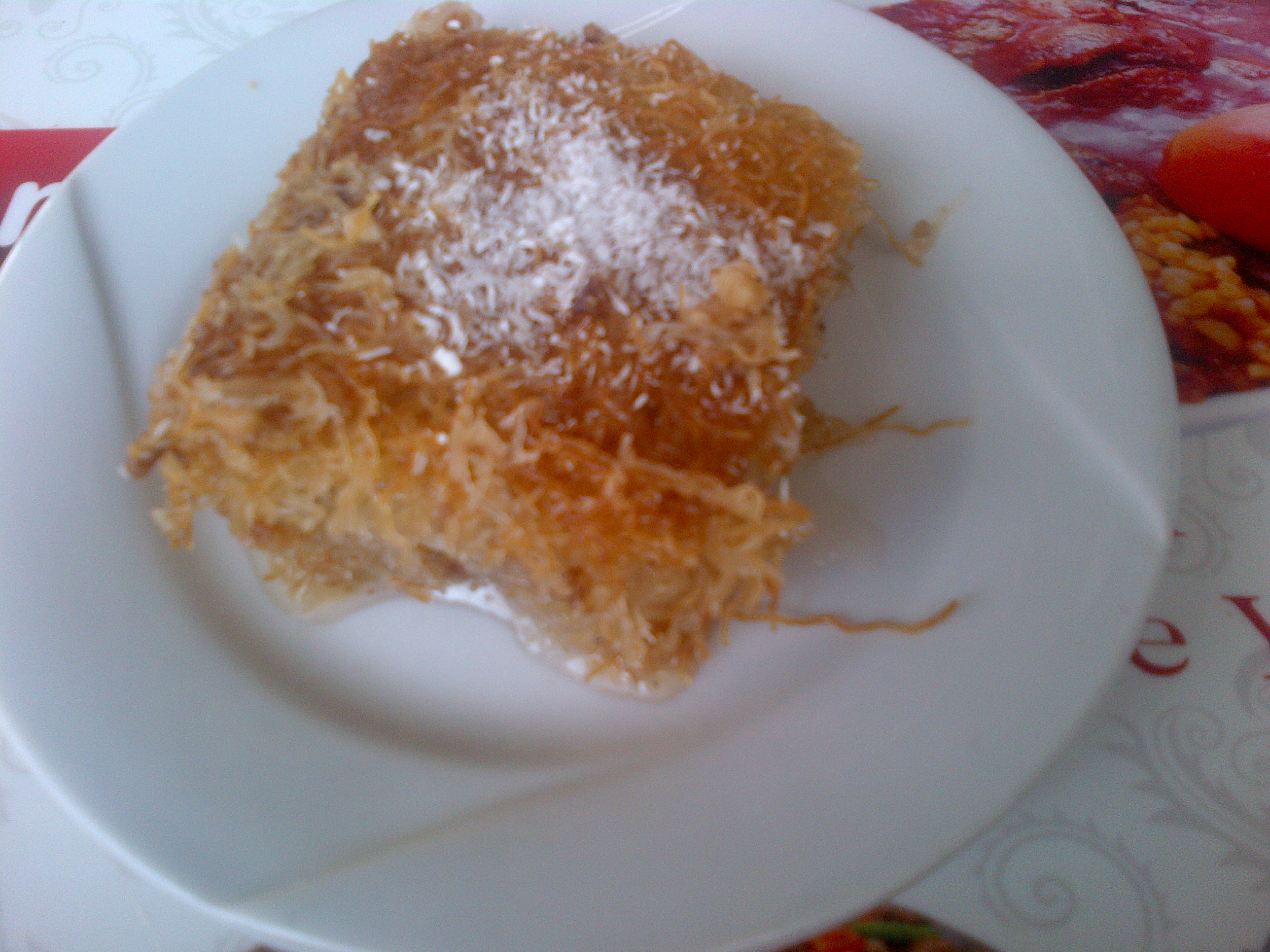 "Tel kadayıf" es un postre turco hecho con masa convertida en hilos o alambre ("tel" en turco) y horneado. Lleva jarabe y nueces (o pistachios).